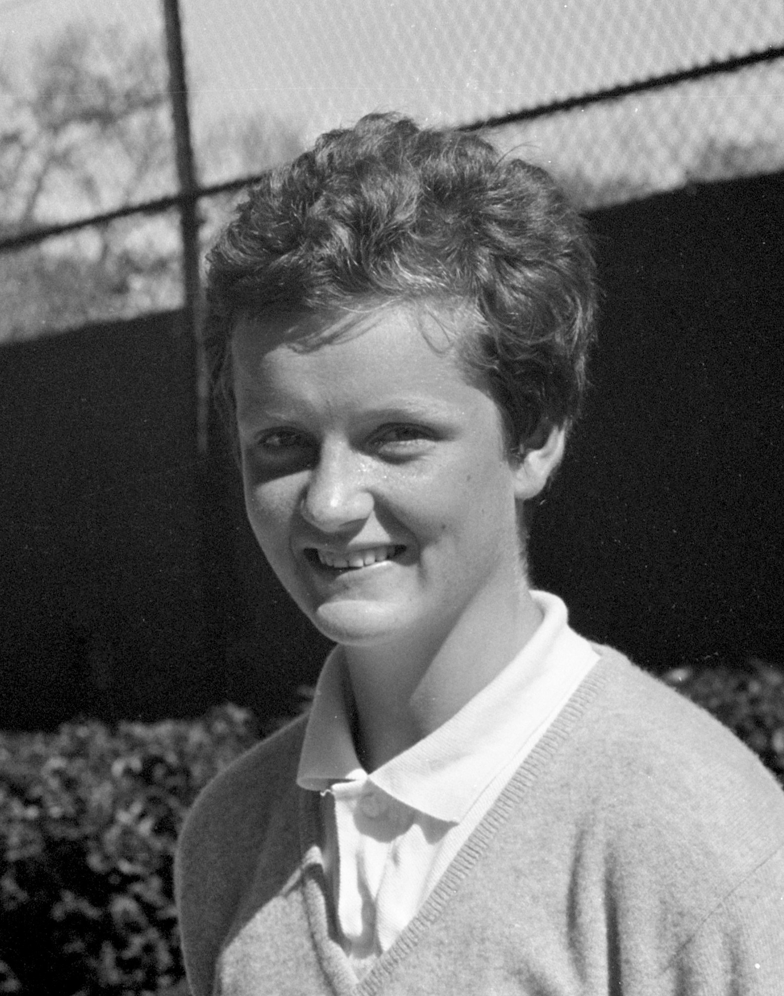 Tenniskampioenschap Nederland, kopjes van Betty Stove